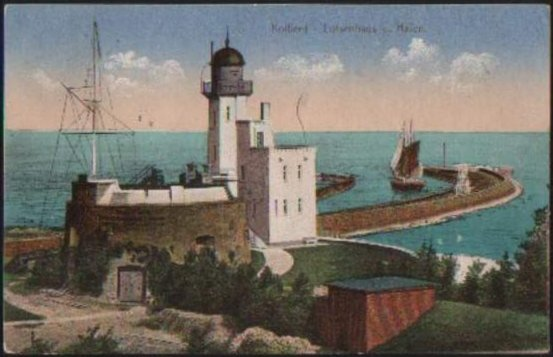 Wygląd z lat 1909-1945. Kartka z 1913.